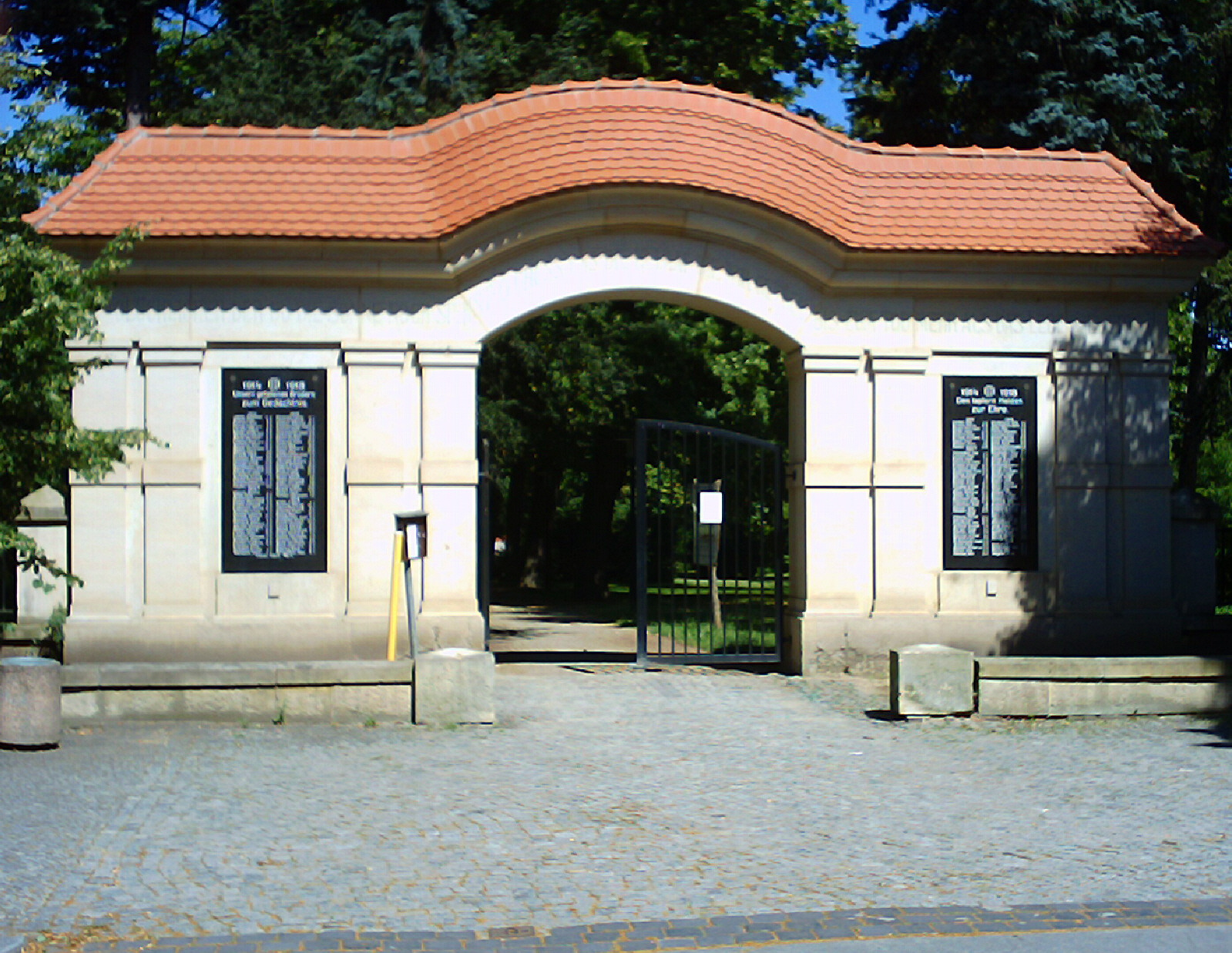 Das Heldentor in Elsterwerda